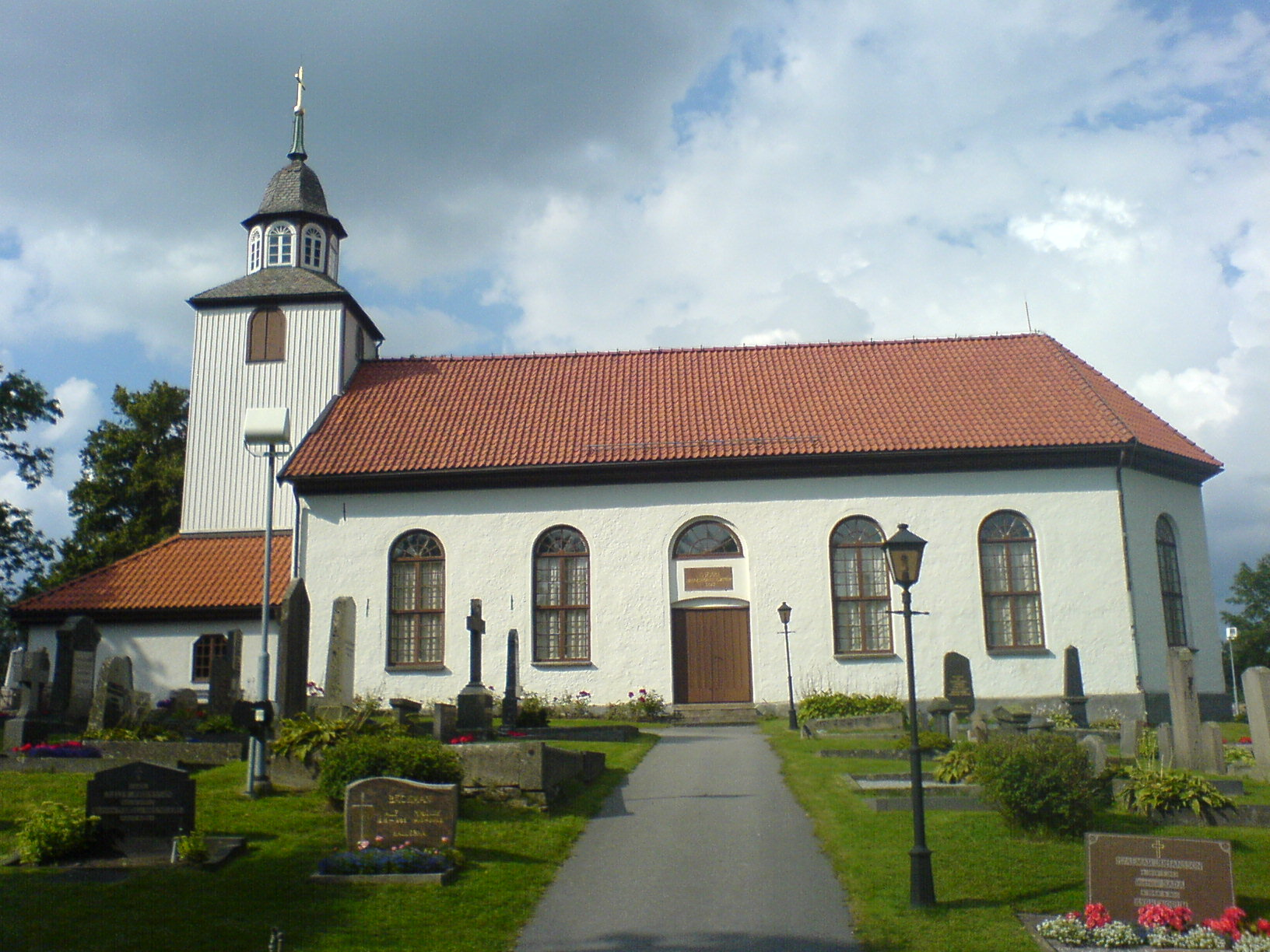 Norums kyrka från söder.